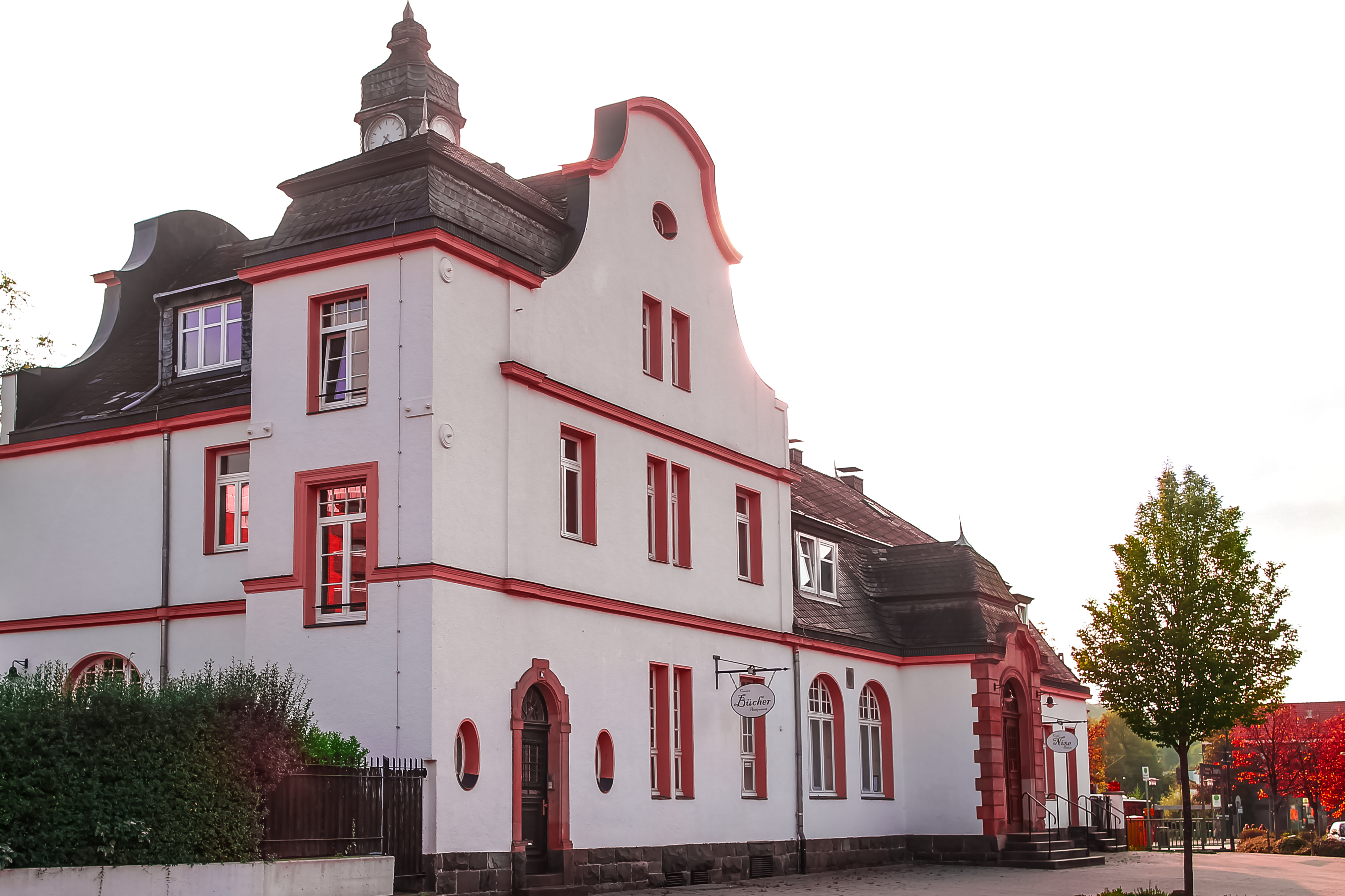 Deutschland 40699 Erkrath Bahnstraße 1